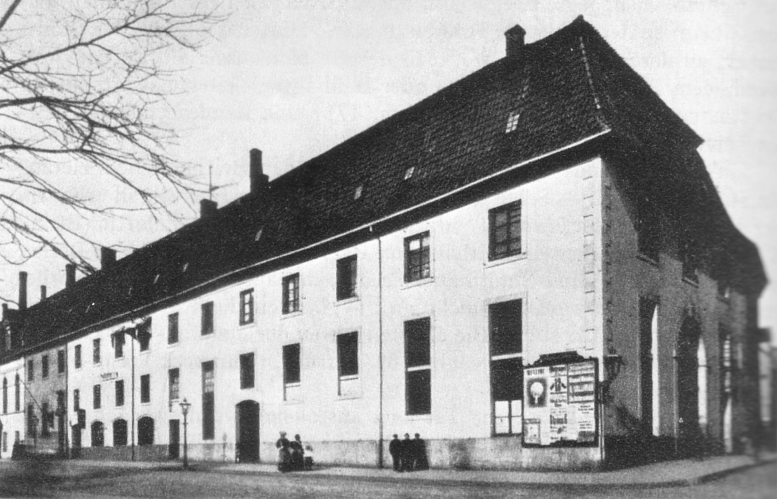 Neuer Marstall der Hofmarställe am Hohen Ufer in Hannover